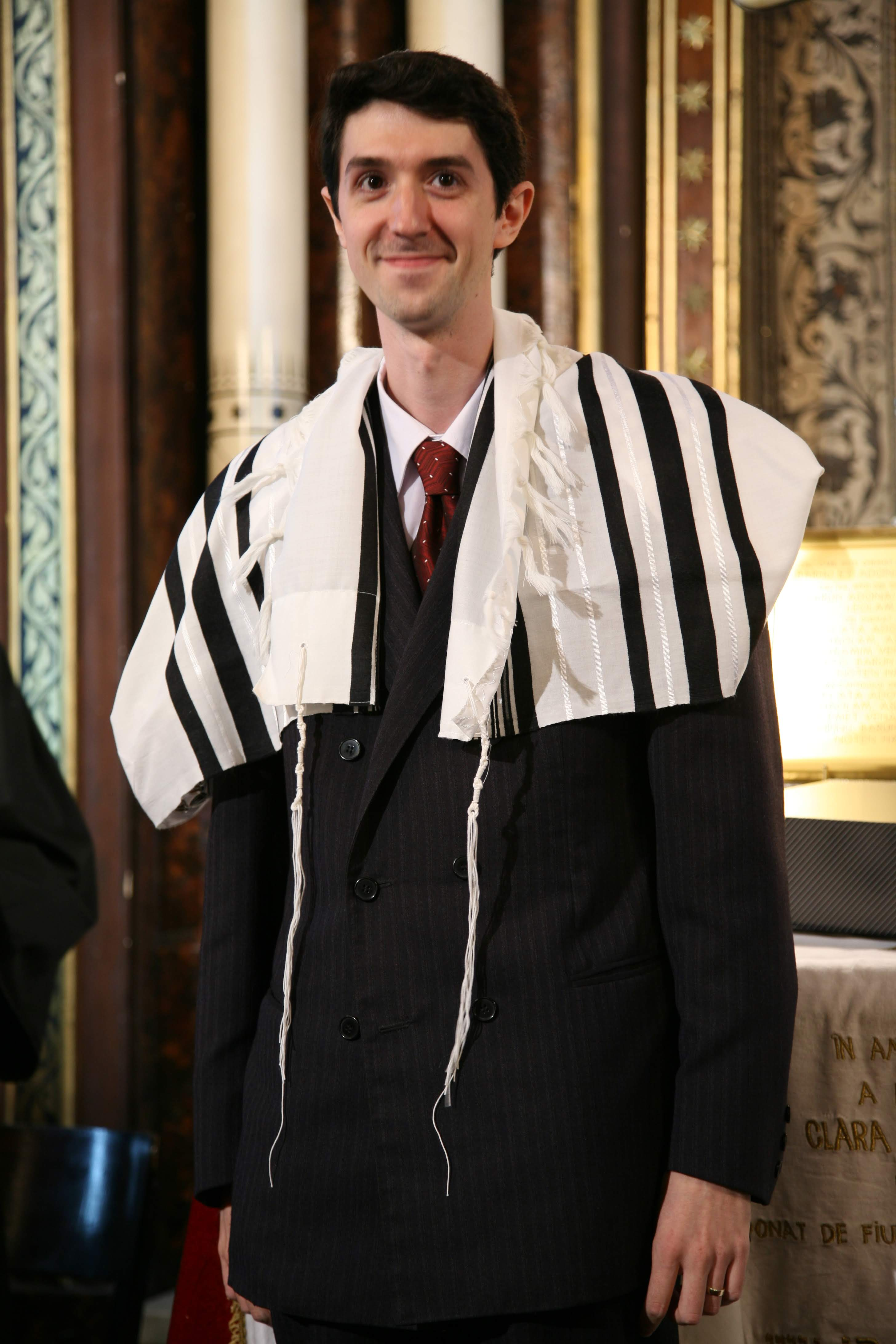 Rabinul Sorin Rosen la ceremonia de investire (2007)